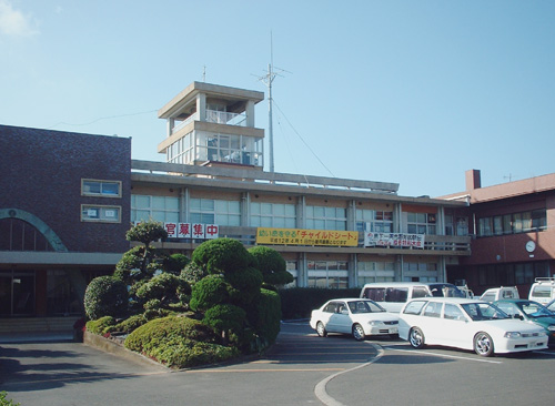 中種子町役場庁舎